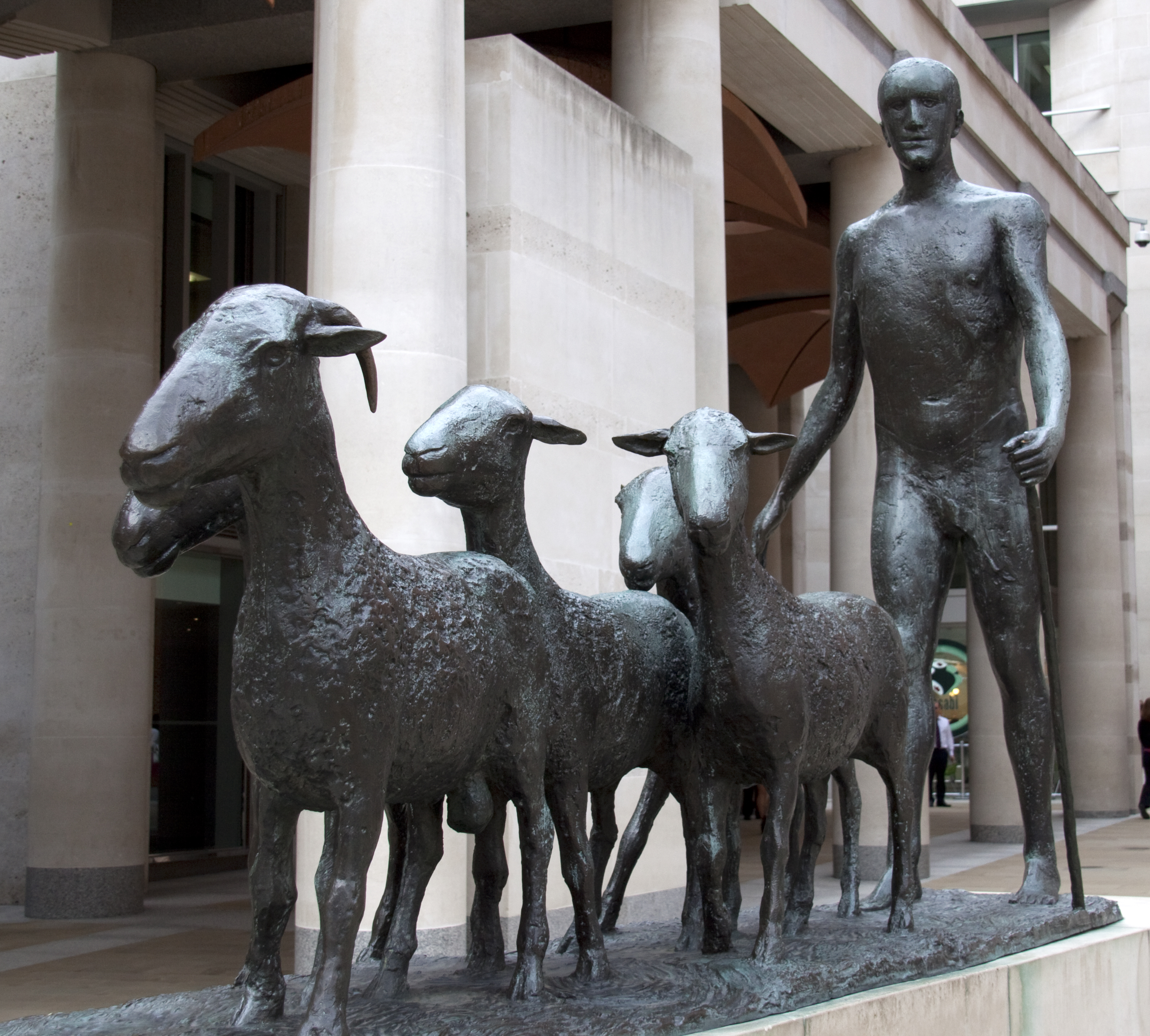 Elisabeth Frink - Paternoster